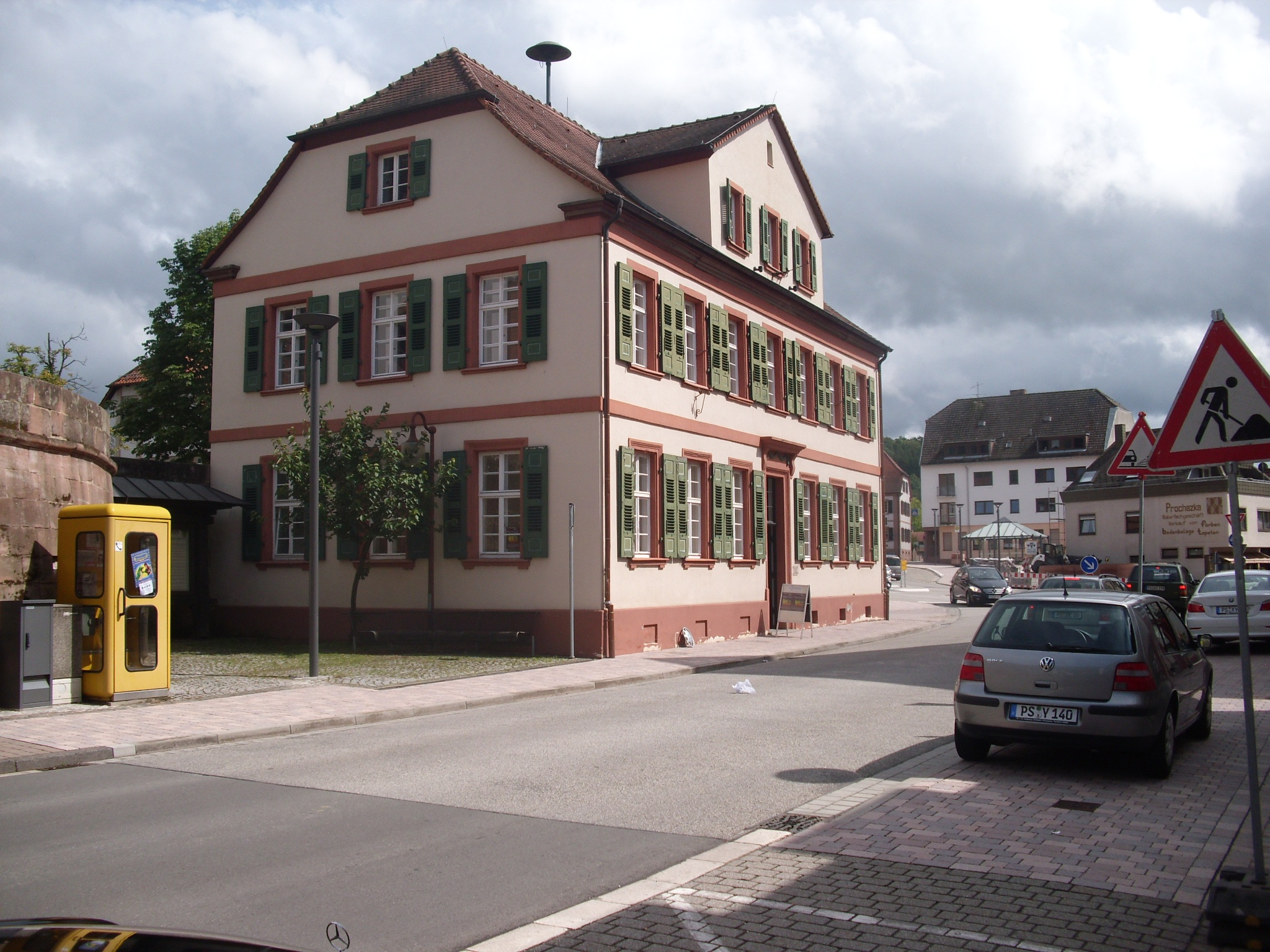 Altes Rathaus der Stadt Dahn - Rheinland Pfalz - Deutschland